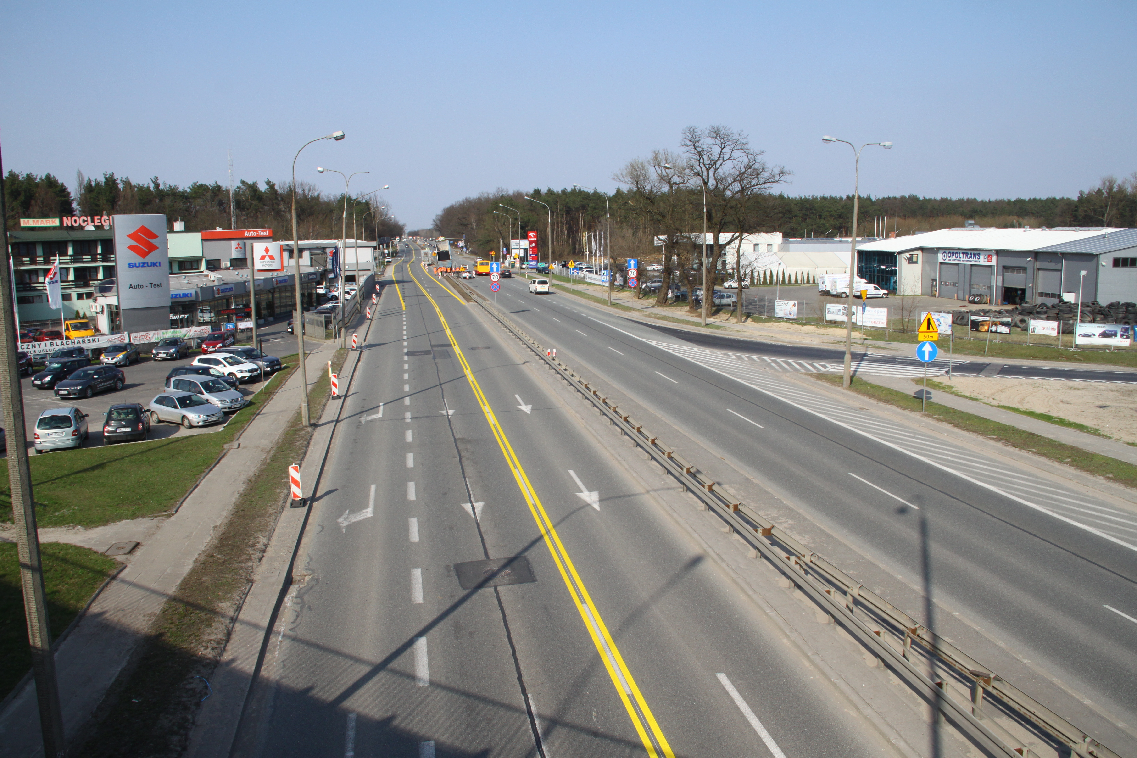 Droga wojewódzka nr 629 (dawna droga krajowa nr 8) w Markach. Widok z wiaduktu drogi wojewódzkiej nr 631 przechodzącej nad nią w Strudze, w Markach, Polska